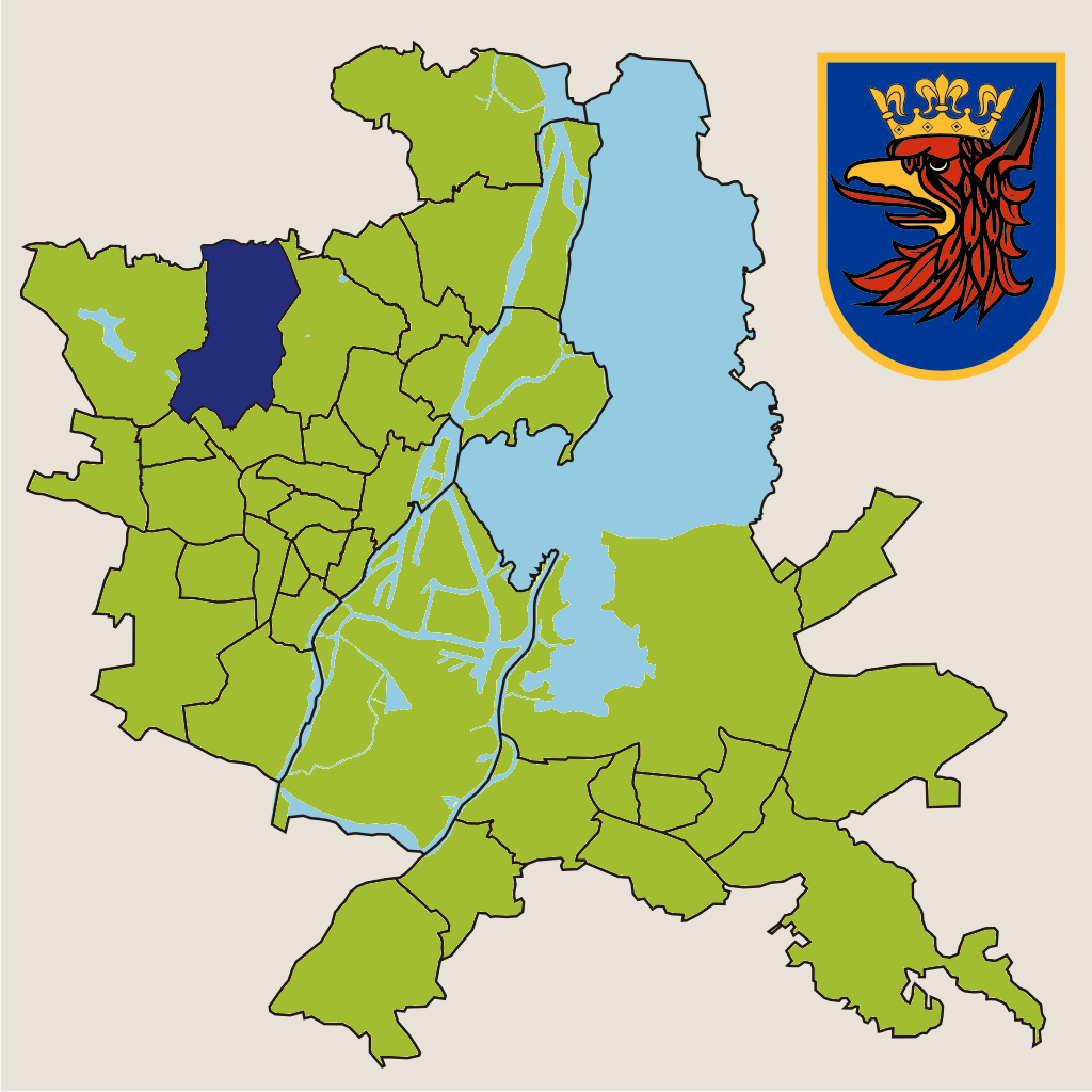 Osiedle "Osów" w Szczecinie – jednostka pomocnicza miasta w 2010